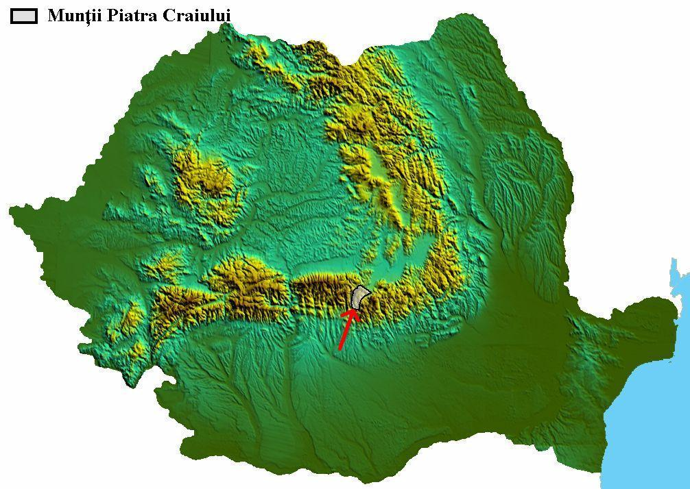 Munţii Piatra Craiului